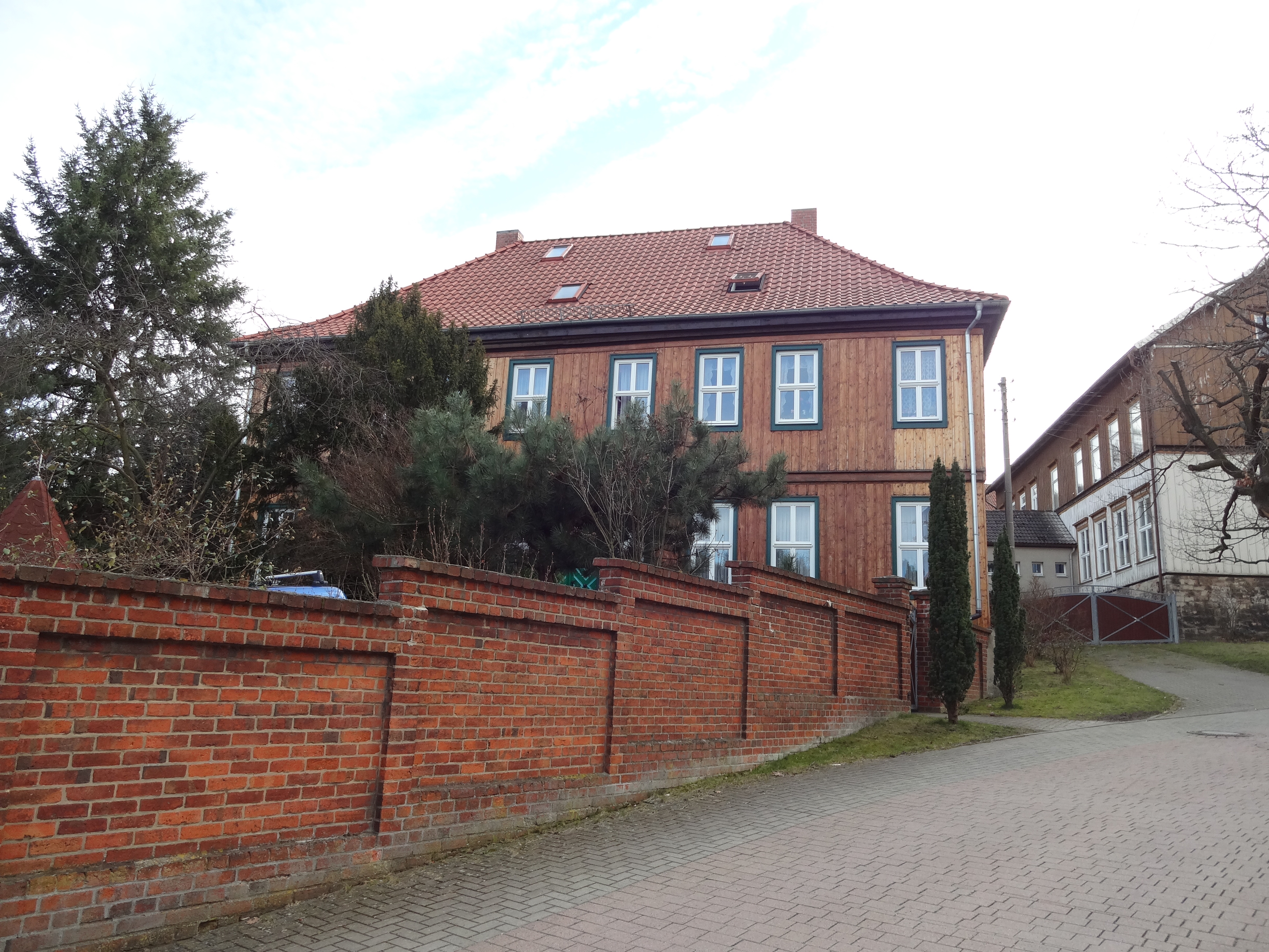 Denkmalgeschützter Pfarrhof in der Schulstraße 3 in Benzingerode (Ortsteil von Wernigerode)